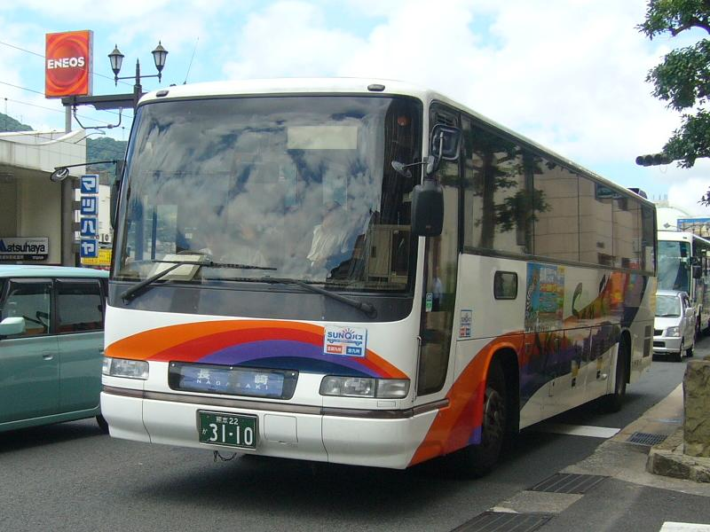 登録番号 熊本22か31-10 九州産業交通所属 りんどう号用 2006年7月28日 長崎県営バスターミナル付近にて撮影